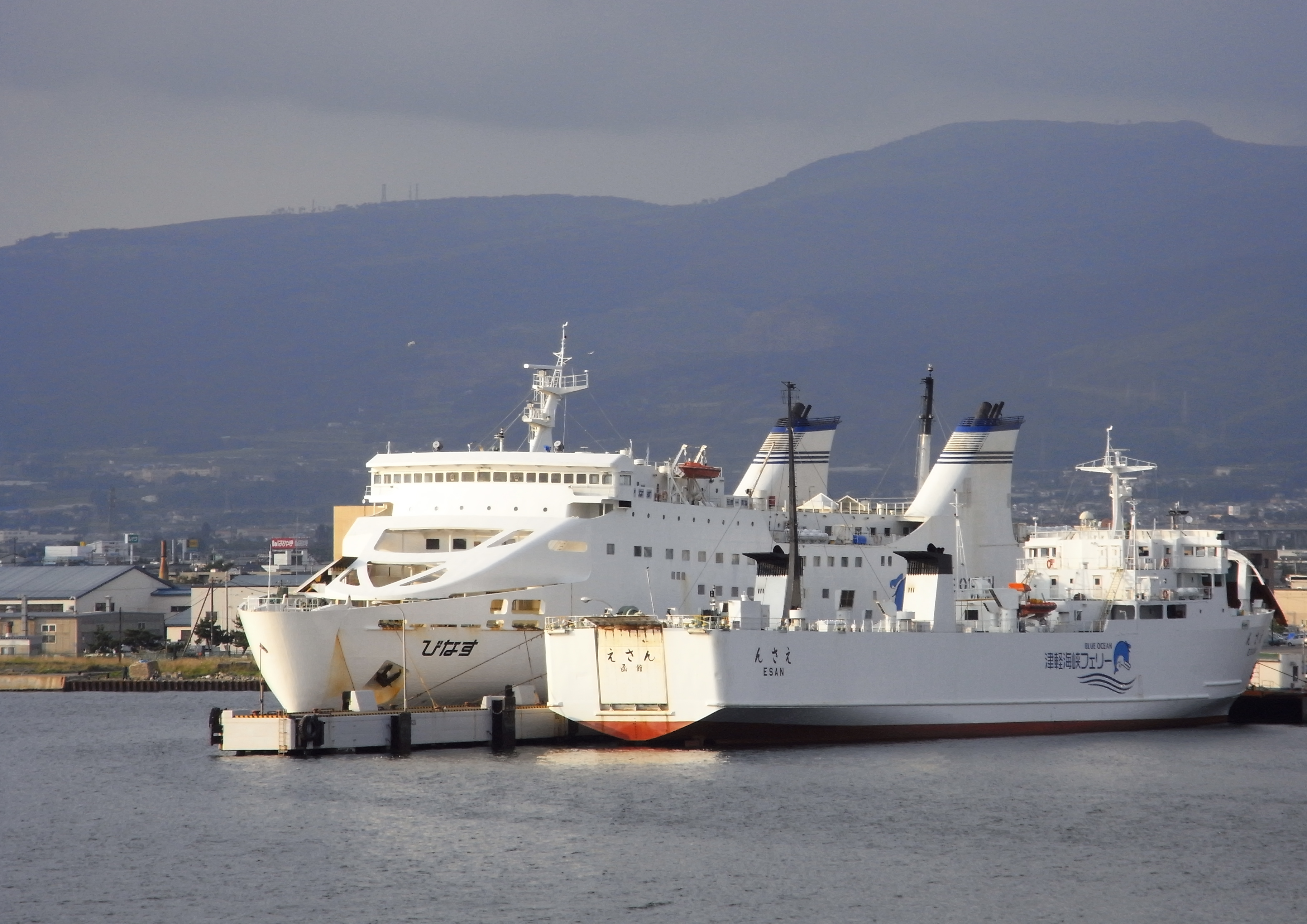 函館港フェリーターミナルに接岸中の津軽海峡フェリー「びなす」（左）、「えさん」（右）、2009年8月15日撮影。